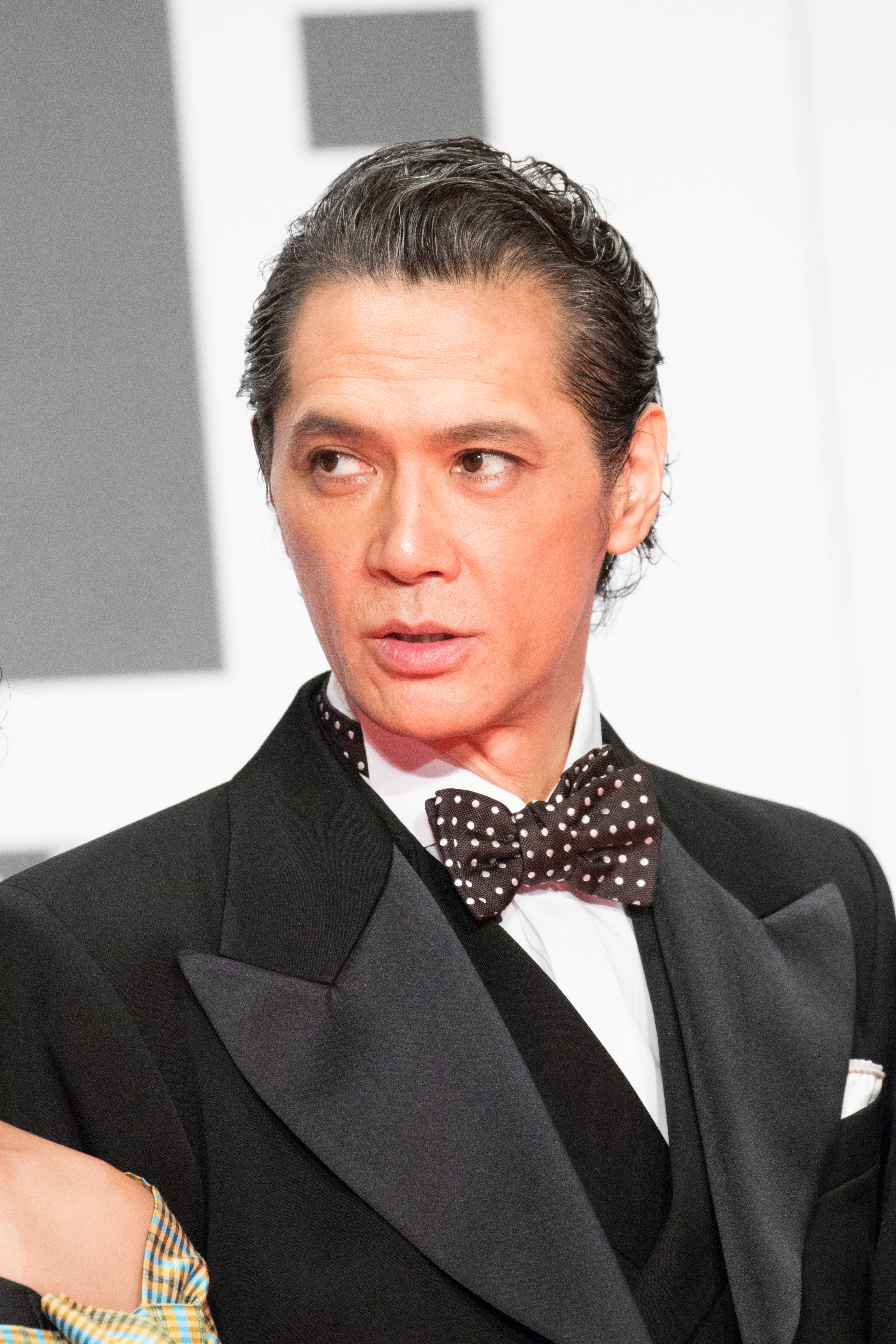 第29回 東京国際映画祭 オープニングセレモニー 加藤雅也 (Beyond The Bridge)